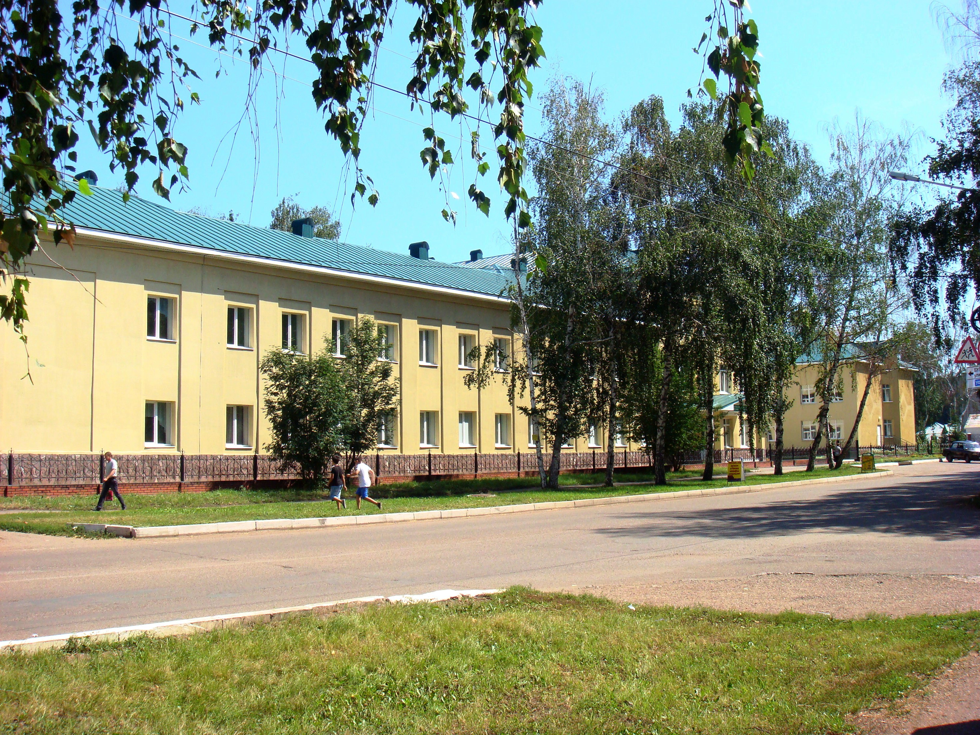 Башкирская республиканская гимназия-интернат № 2 им. Ахмет-Заки Валиди. Вид с улицы Советской, справа - пересечение с ул. Геологической